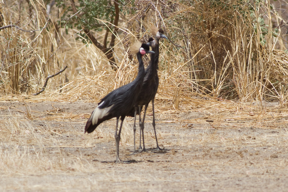 Balearica pavonina, Waza National Park, Cameroon